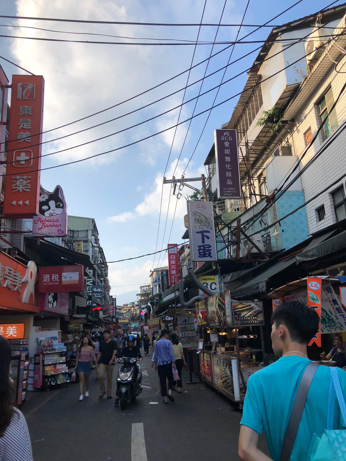 台北士林夜市街景